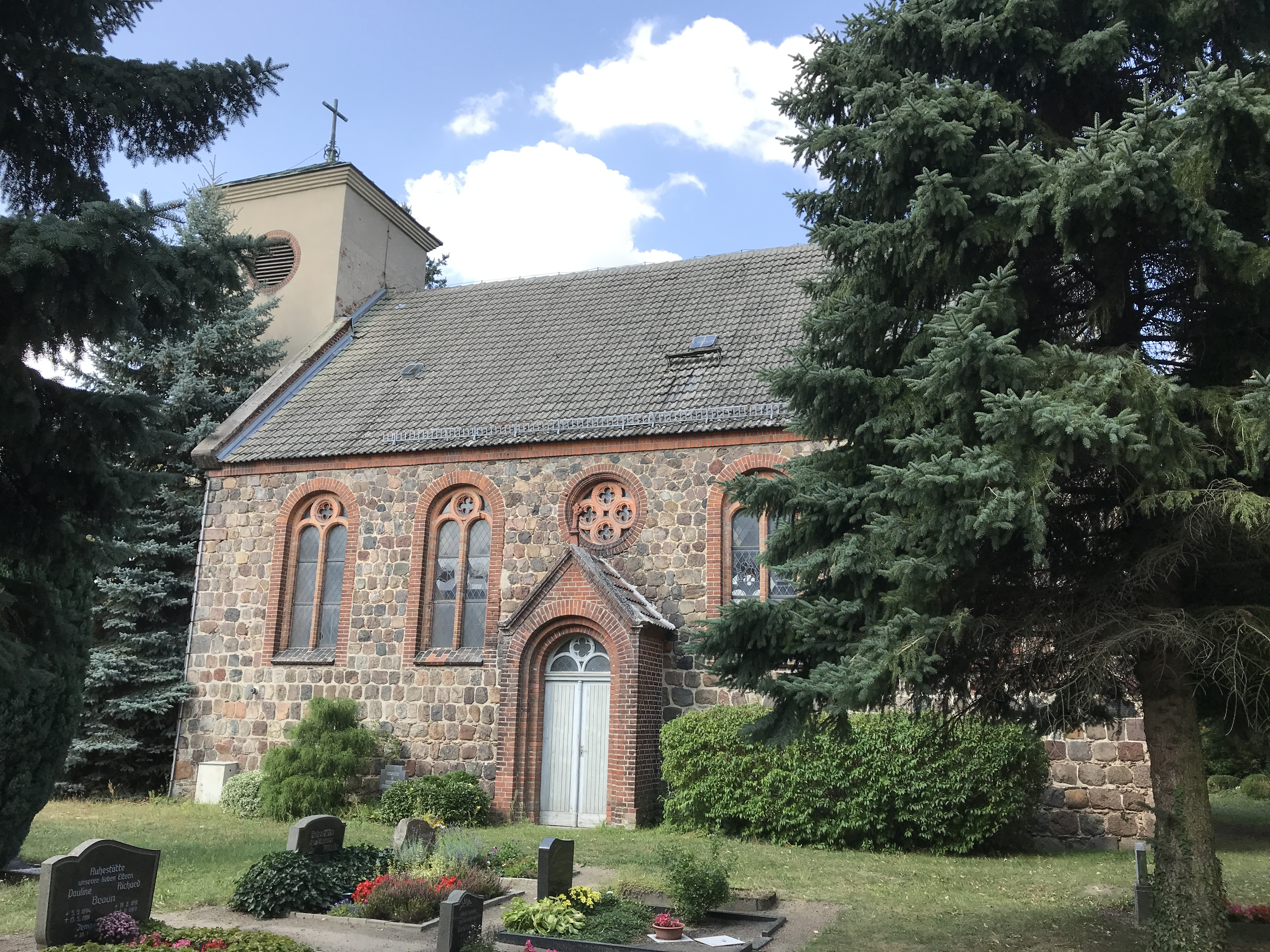 Die Dorfkirche Neuendorf im Sande der Gemeinde Steinhöfel im Landkreis Oder-Spree entstand in der zweiten Hälfte des 13. Jahrhunderts. 1938 musste der Kirchturm verkürzt werden, um die Einflugschneise für den Flugplatz Fürstenwalde zu vergrößern.